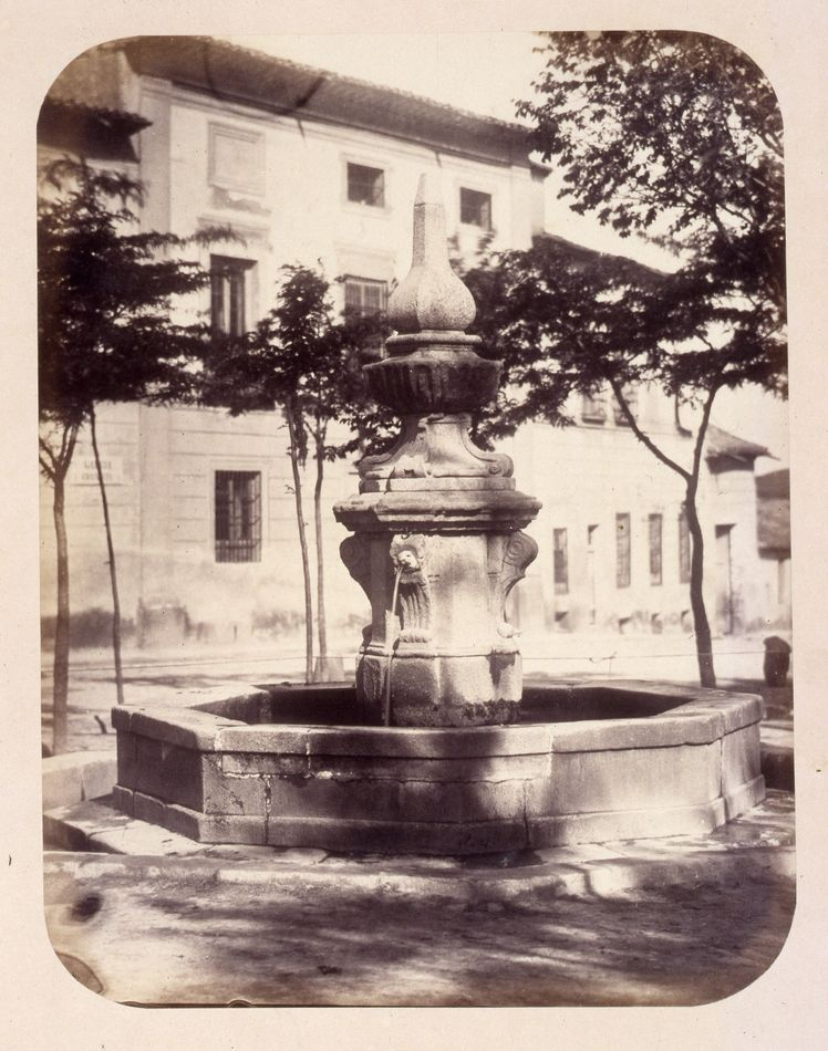 Fuente de la antigua plazuela de Afligidos. Obra en 1864 del fotógrafo toledano Alfonso Begué, muerto el 31 de octubre de 1865. Cartulina sepia. Albúmina. 43 x 32 cm. Fotografía contenida en un álbum procedente del Archivo de Villa y trasladado al Museo de Historia en 1983.